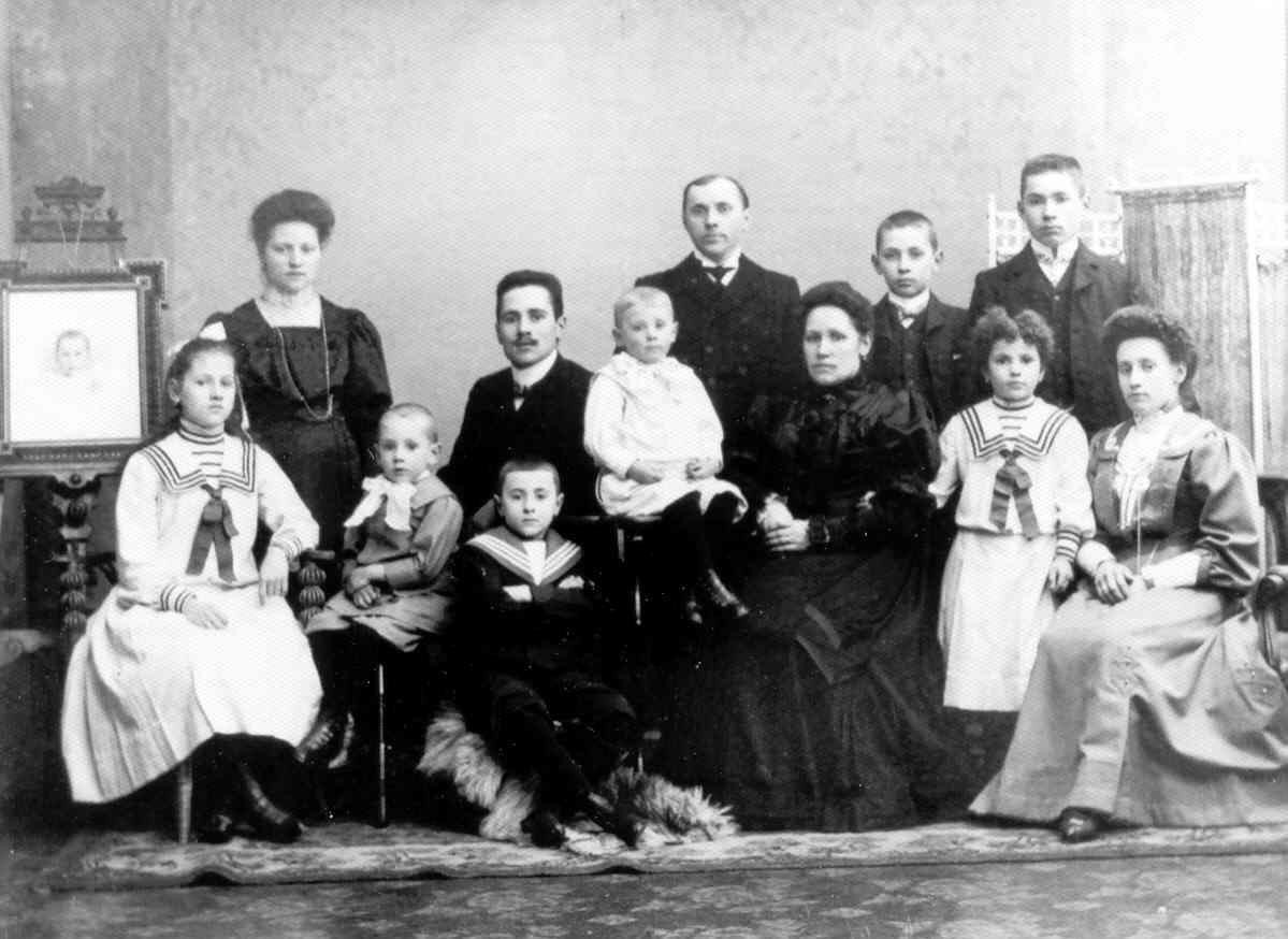 Gezin Engelman-Engelkamp: Links op schilderij het overleden broertje Bentje: *†1894, Boven van links naar rechts; Riek 1885 - †1946, Fons 1884 - †1928, (vader) Kees Engelman *1859 - †1922, Bep *1891 - †1951, Louis *1888 - †1932 Onder van links naar rechts; Marie 1893 - †1956, Jan 1900 - †1972, Kees 1896 - †1940, Toon 1901 - †1977, (moeder) Carolien Engelkamp 1858 - † 1933, Carolien 1897-†1980, Dora 1881-†1946